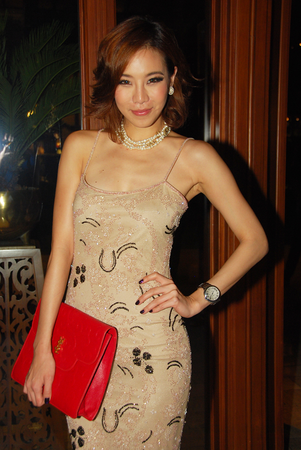 คริส หอวัง